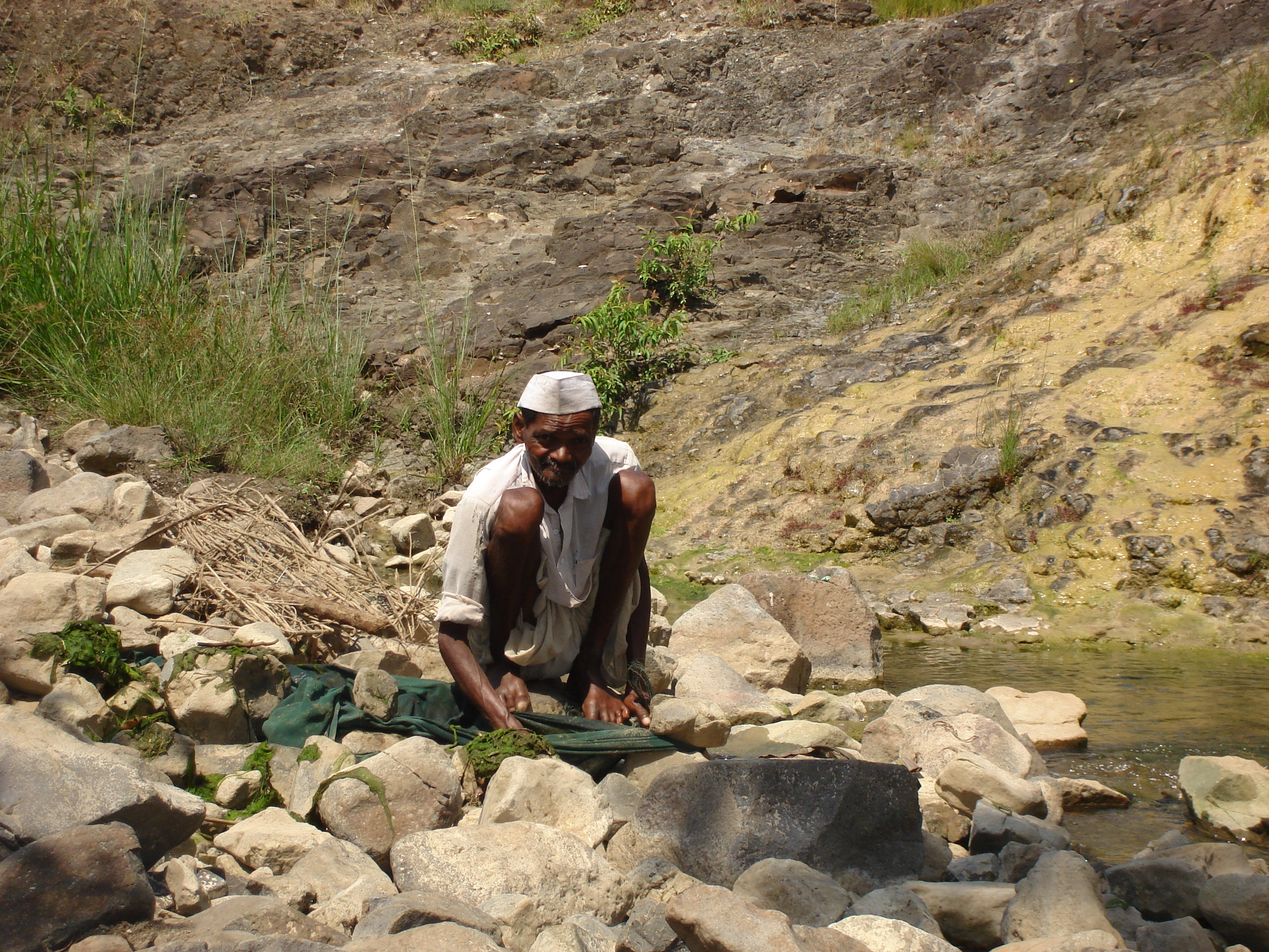 जाळे लावताना